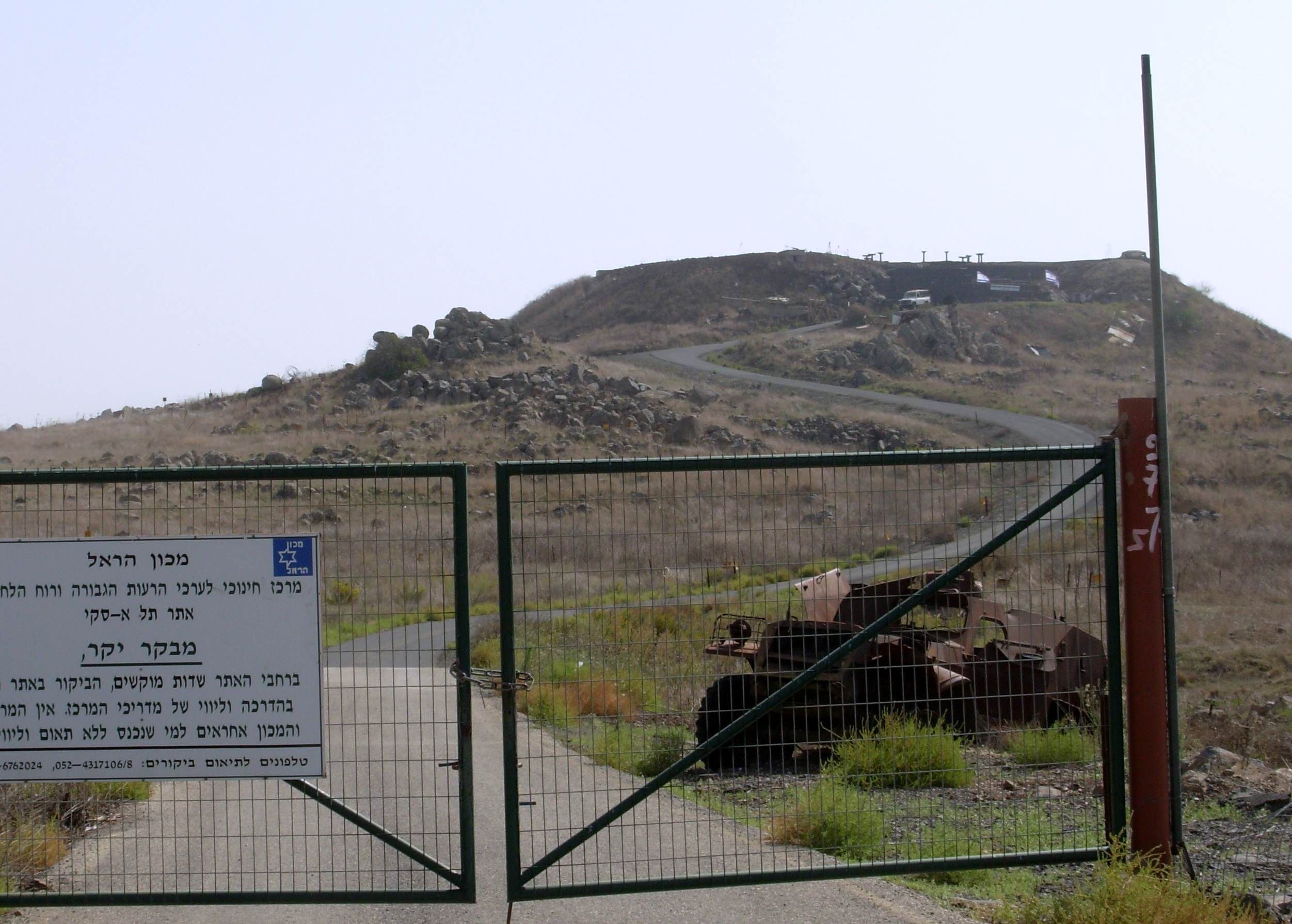 כניסה לתל סאקי